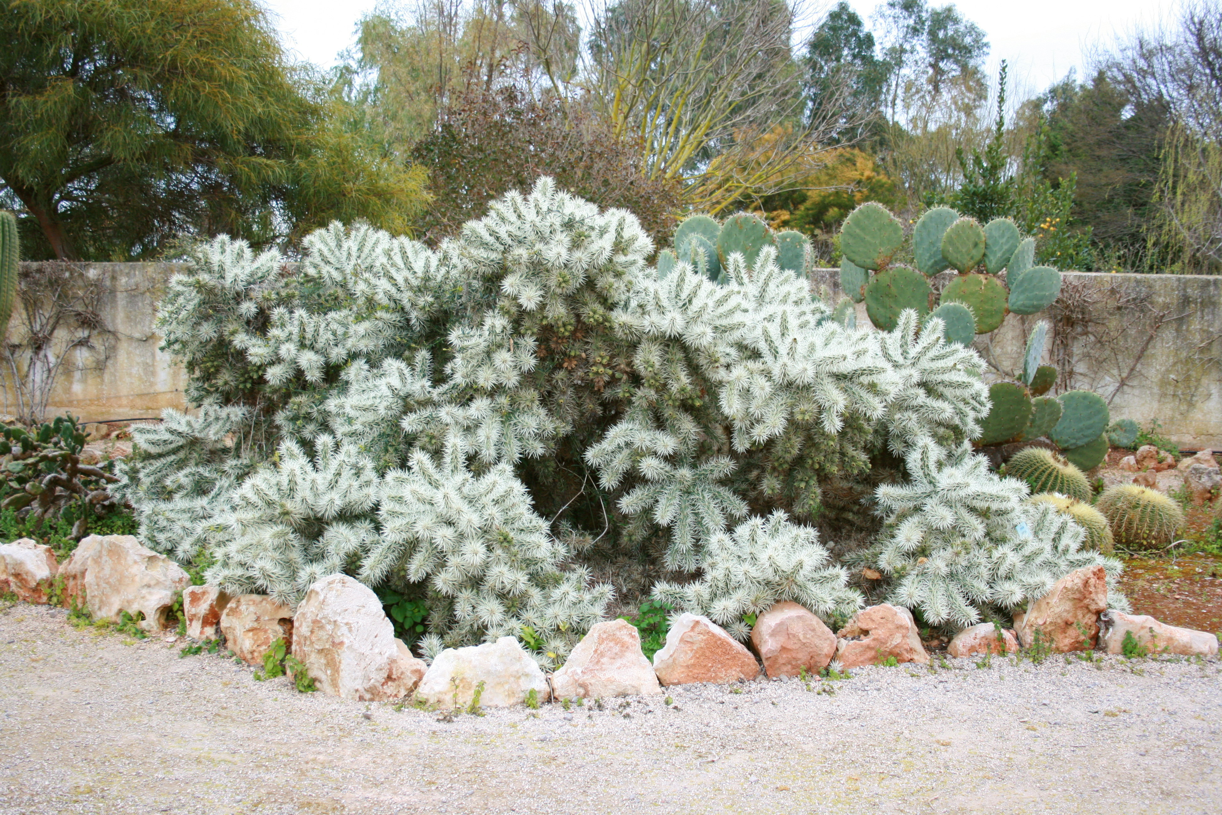 Botanicactus in Ses Salines, Mallorca, Spain